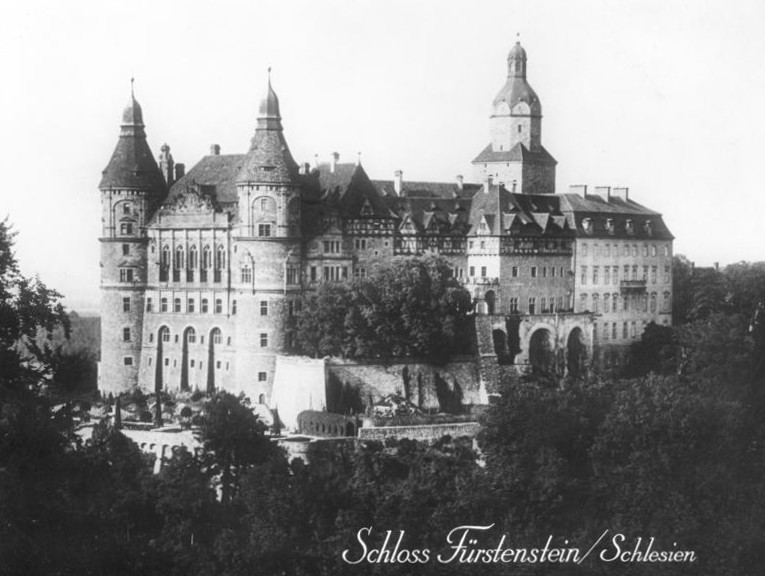 Schloss Fürstenstein/Schlesien Information added by Wikimedia users.